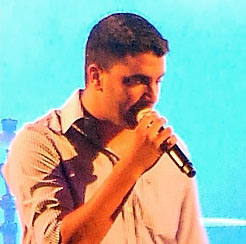 תמונת משה פרץ מתוך הופעה בירושלים